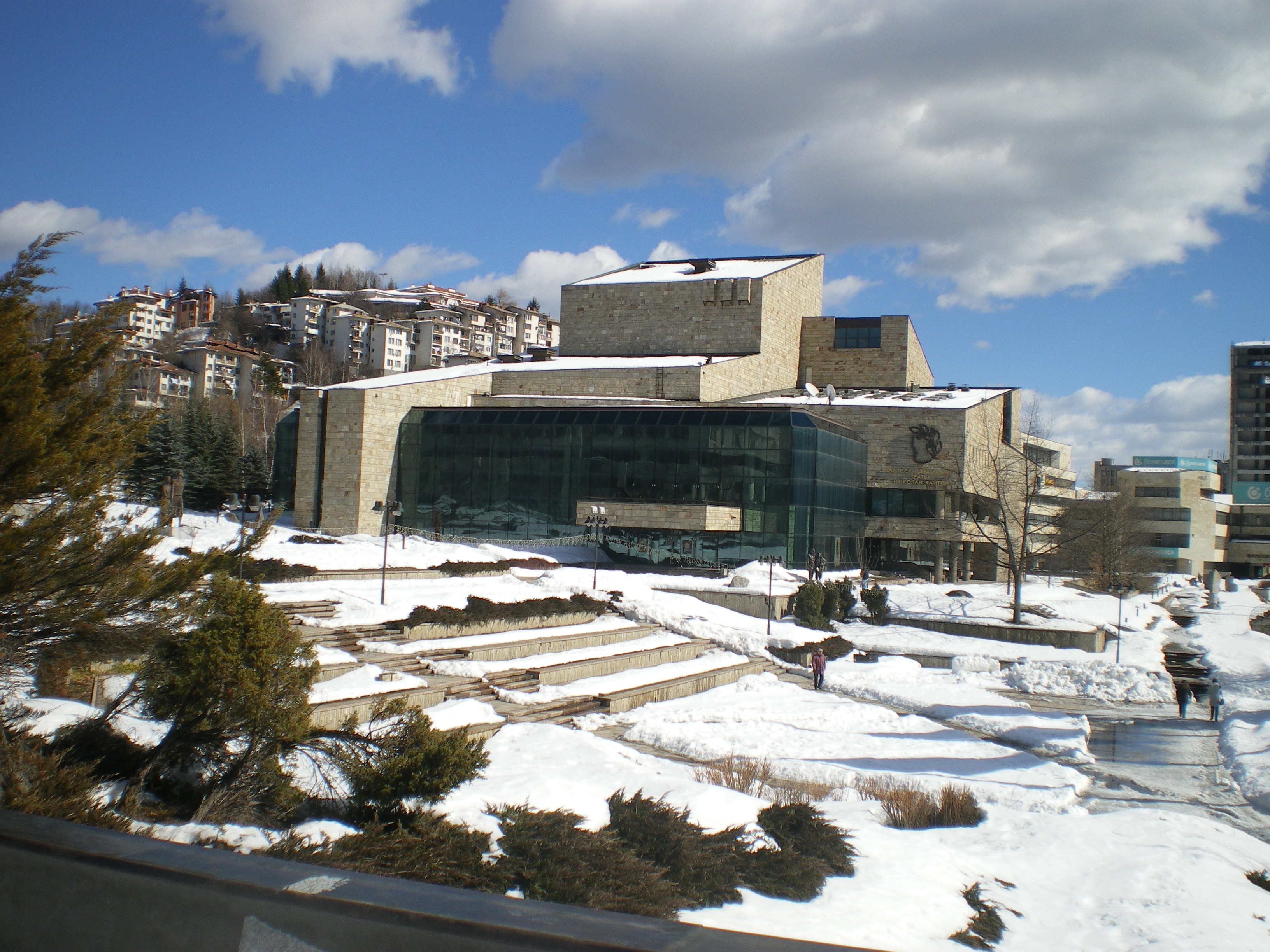 Сградата на Родопски драматичен театър е построена през 1984 година и е уникална като мащаб и архитектура на територията на страната.